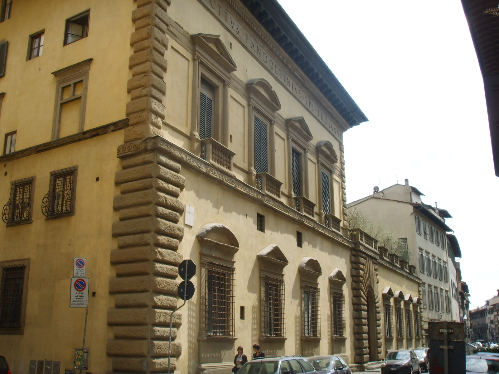 Palazzo Pandolfini, view